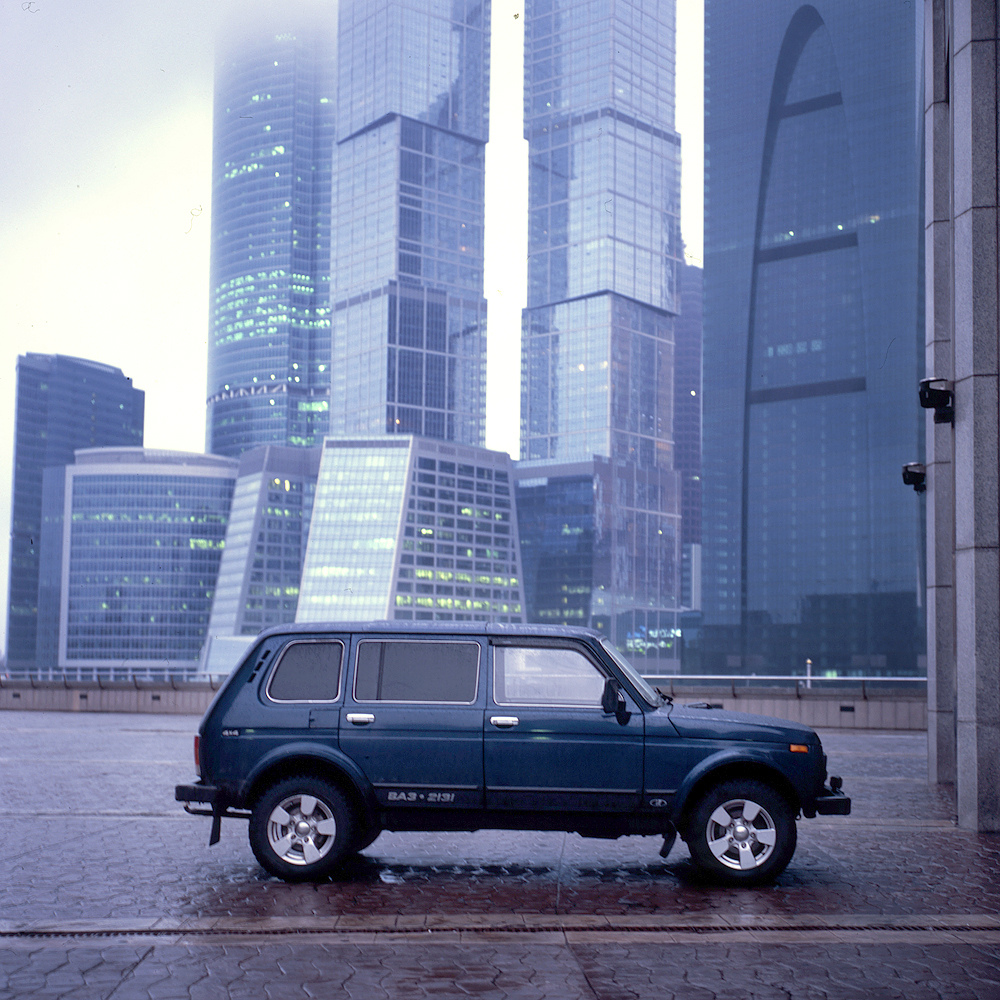 Moscow city